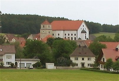 Summary Heilig-Kreuz-Kirche in Bergen bei Neuburg Quelle: selbst fotografiert Fotograf: Benutzer:Eppasandas Datum: Juni 2006